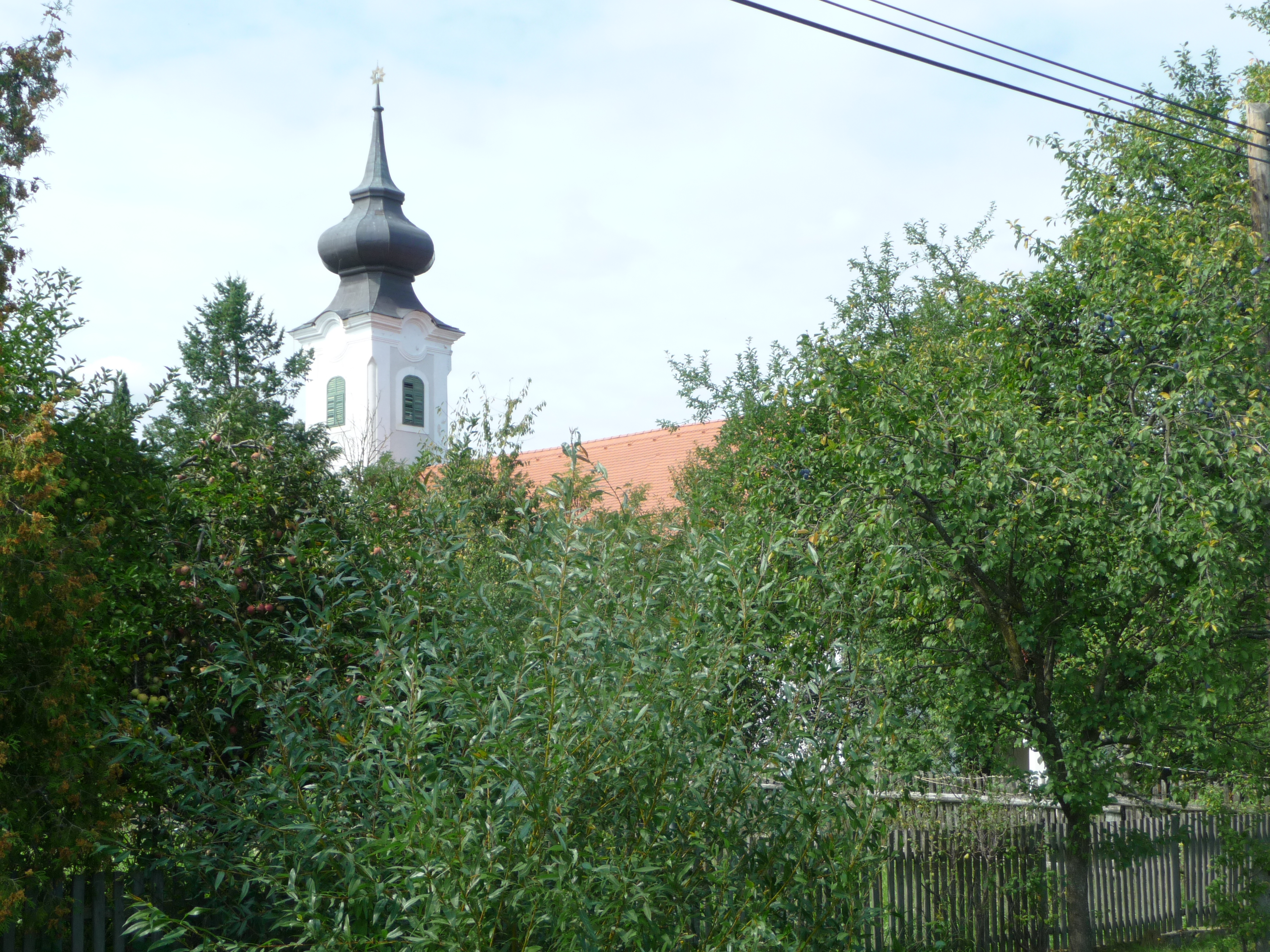 A szentgyörgyvölgyi református templom hagymakupolás tornya délről